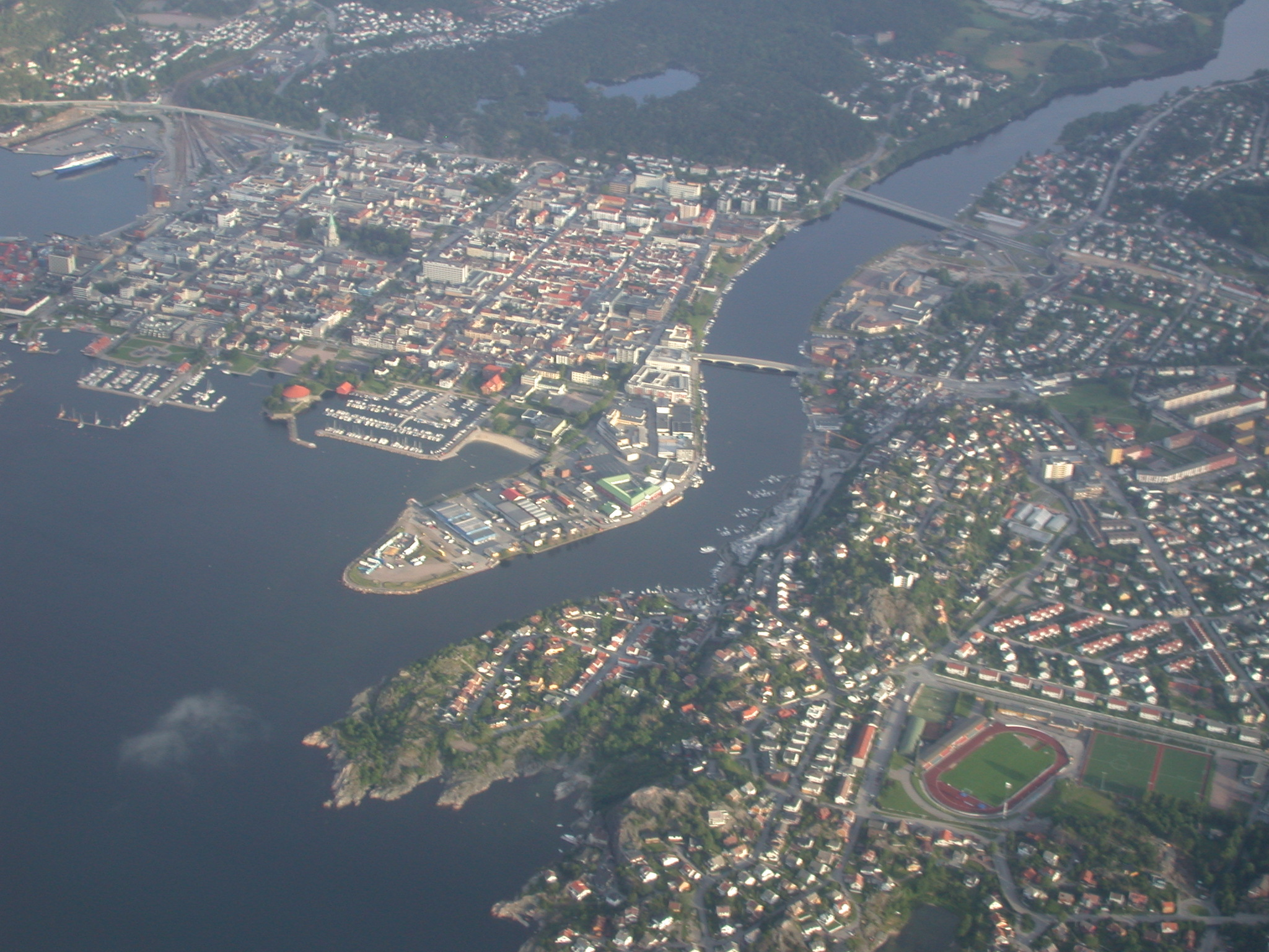 Kristiansand sett frå fly